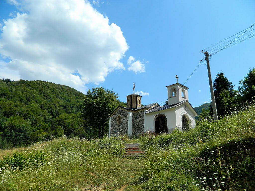 Св Никола Село Трница